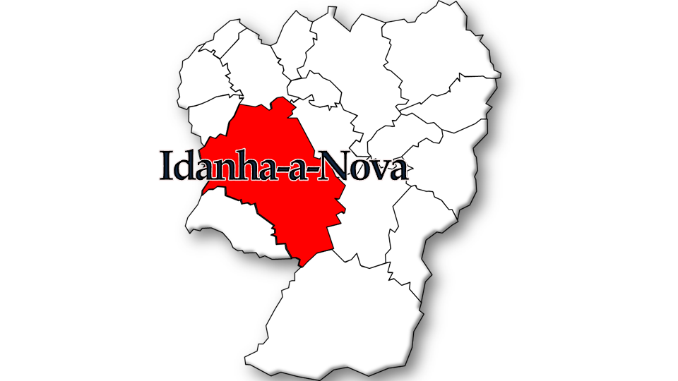 População